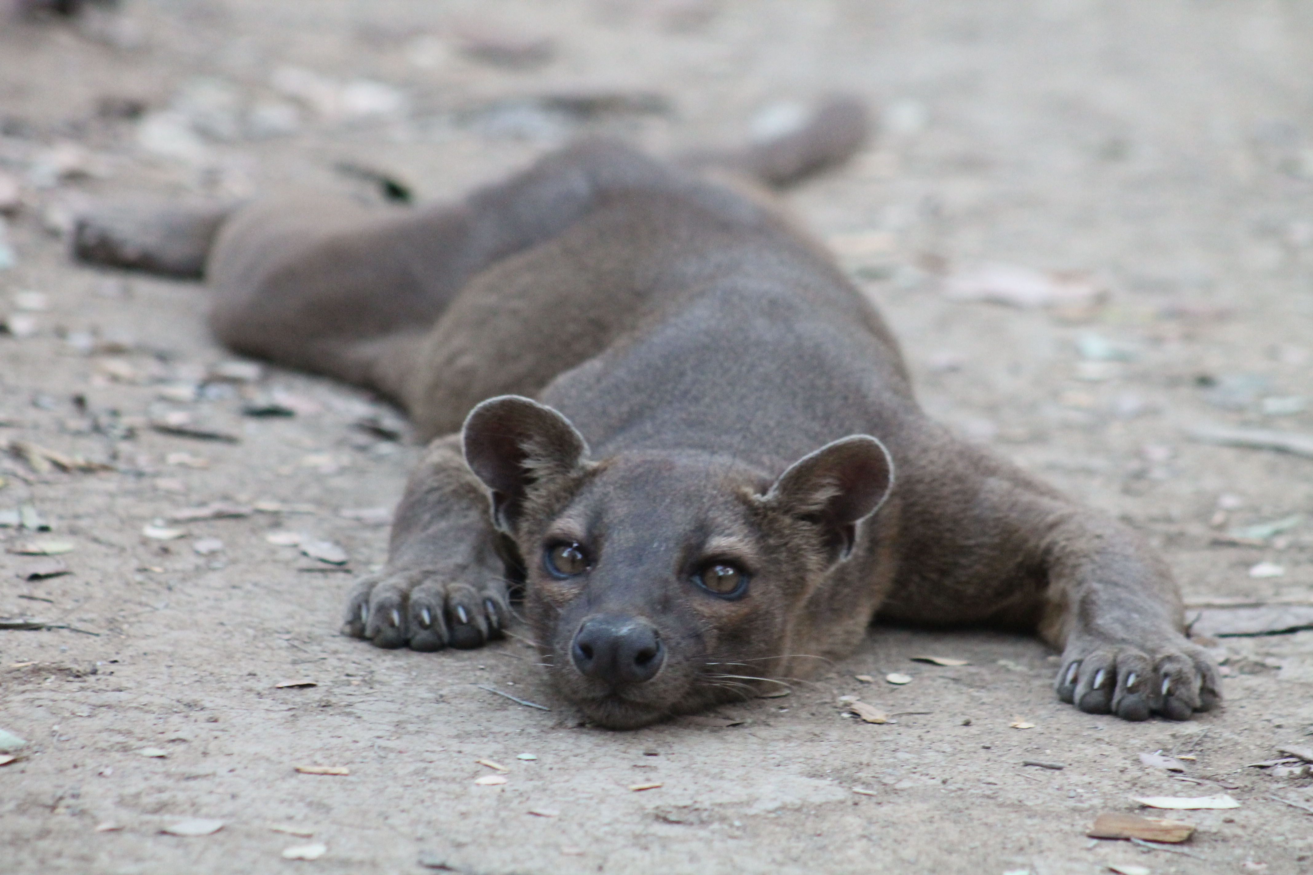 Fossa in Kirindy